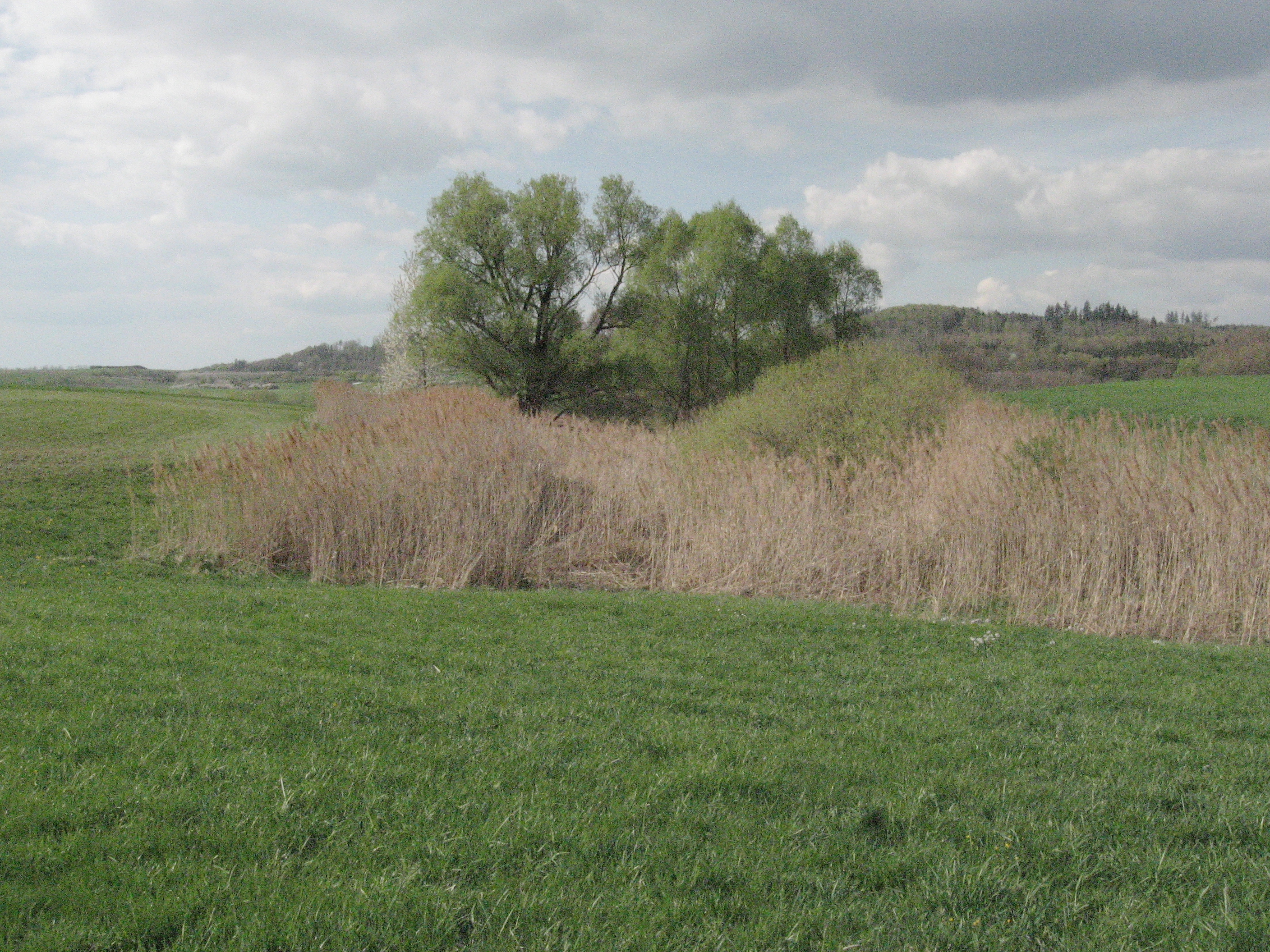 Feuchtgebiet mit Schilf am Bach aus dem oberen Lindich auf Obersontheimer Flur etwa 700 m NW des Bühlertanner Gehöfts Himmelreichs, am oberen Ende der Talbildung eines kleinen linken Zuflusses des Nesselbachs im Gipskeuper.